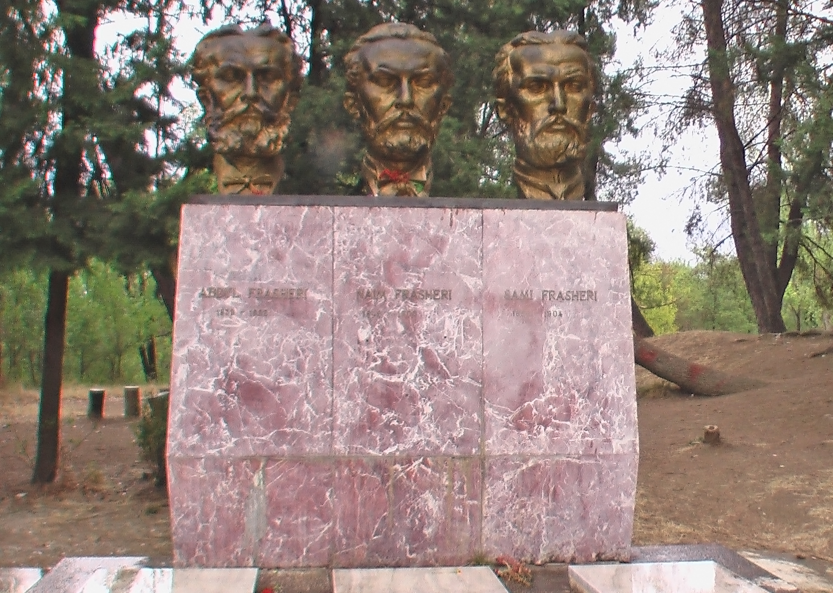 Tirana: Denkmal der Frasheri-Brueder